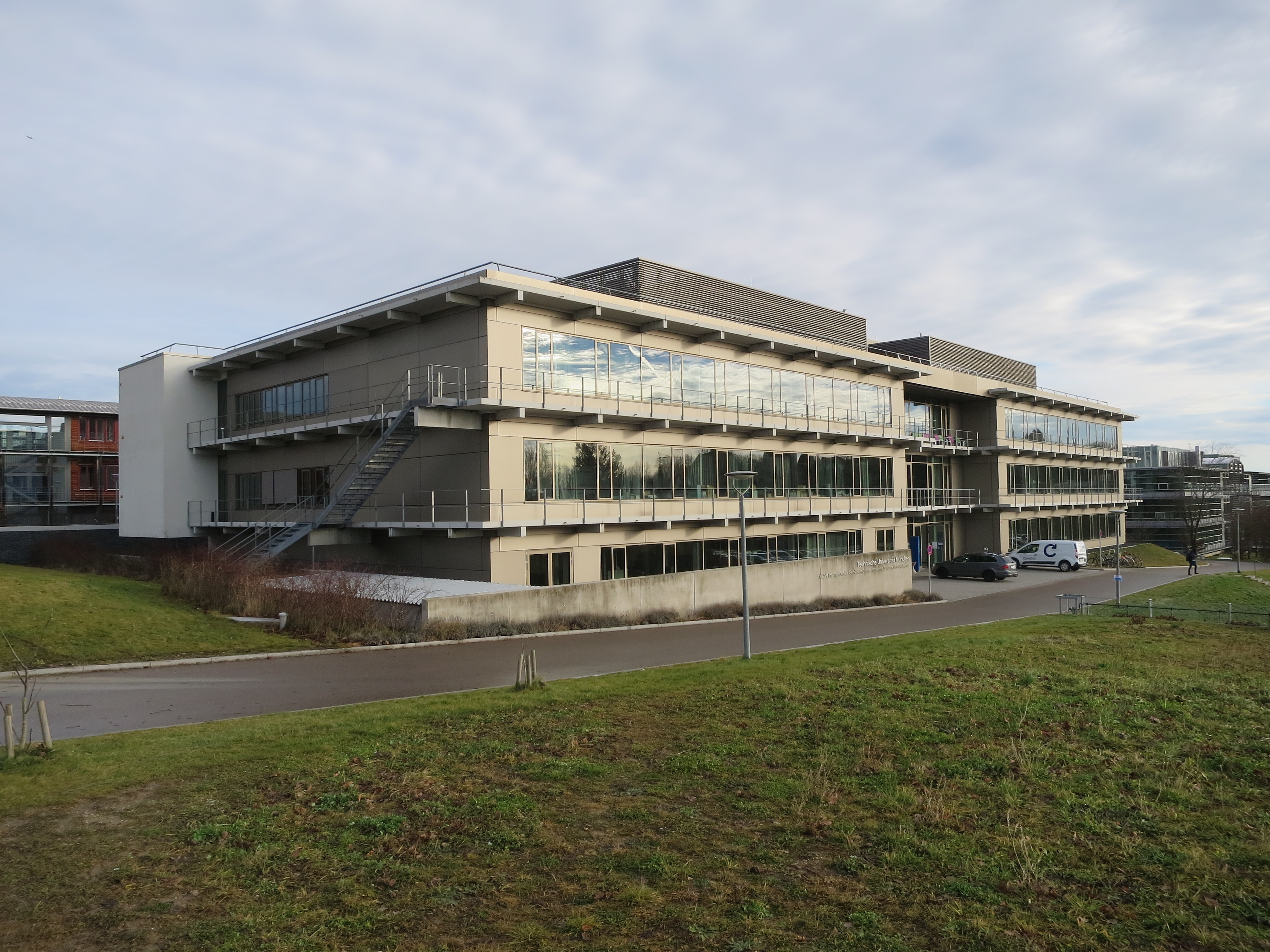 Das IGZW im Jahr 2018